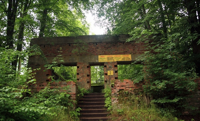 Gierłoż, woj. warmińsko-mazurskie, powiat kętrzyński, gmina Kętrzyn - Wilczy Szaniec